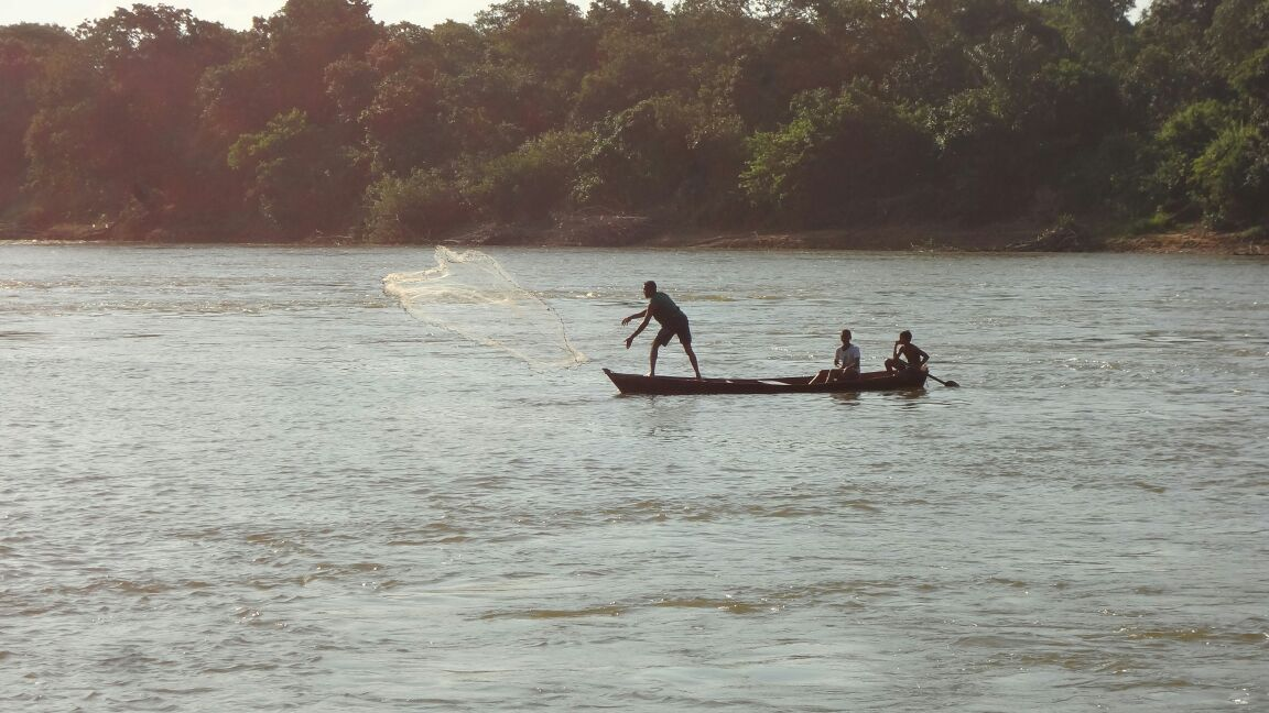 O rio Tocantins é um rio brasileiro que nasce no Distrito Federal na Estação Ecológica de Águas Emendadas, passando logo após pelos estados de Goiás, Tocantins, Maranhão e Pará, até a sua foz no golfo Amazônico - próximo a Belém, onde se localiza a ilha de Marajó. Após a união do rio das Almas, rio Maranhão e rio Paranã, entre os municípios de Paranã e São Salvador do Tocantins (ambos localizados no estado do Tocantins), o rio passa a ser chamado definitivamente de rio Tocantins. Durante a época das cheias, seu trecho navegável é de aproximadamente 2 000 km, entre as cidades de Belém - Pará e Lajeado - Tocantins. O rio Tocantins é o segundo maior rio totalmente brasileiro (perde apenas para o rio São Francisco), e também pode ser chamado de Tocantins-Araguaia, após juntar-se ao rio Araguaia na região do "Bico do Papagaio", que fica localizada entre o Tocantins, o Maranhão e o Pará. É no vale do médio e baixo rio Tocantins que se encontrava a maior concentração de castanheiras da Amazônia.